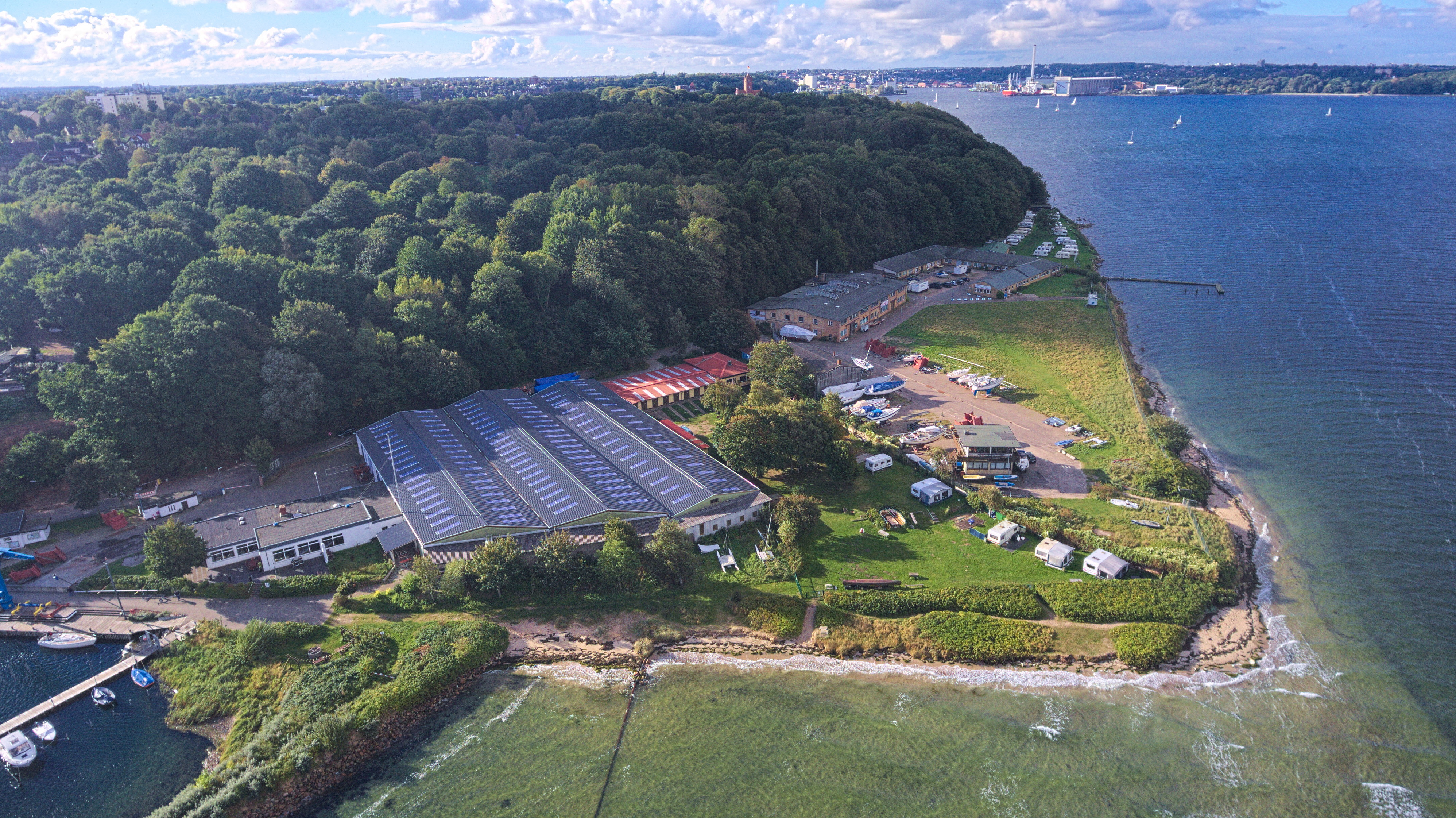 Blick auf das Fahrensodde Gelände.